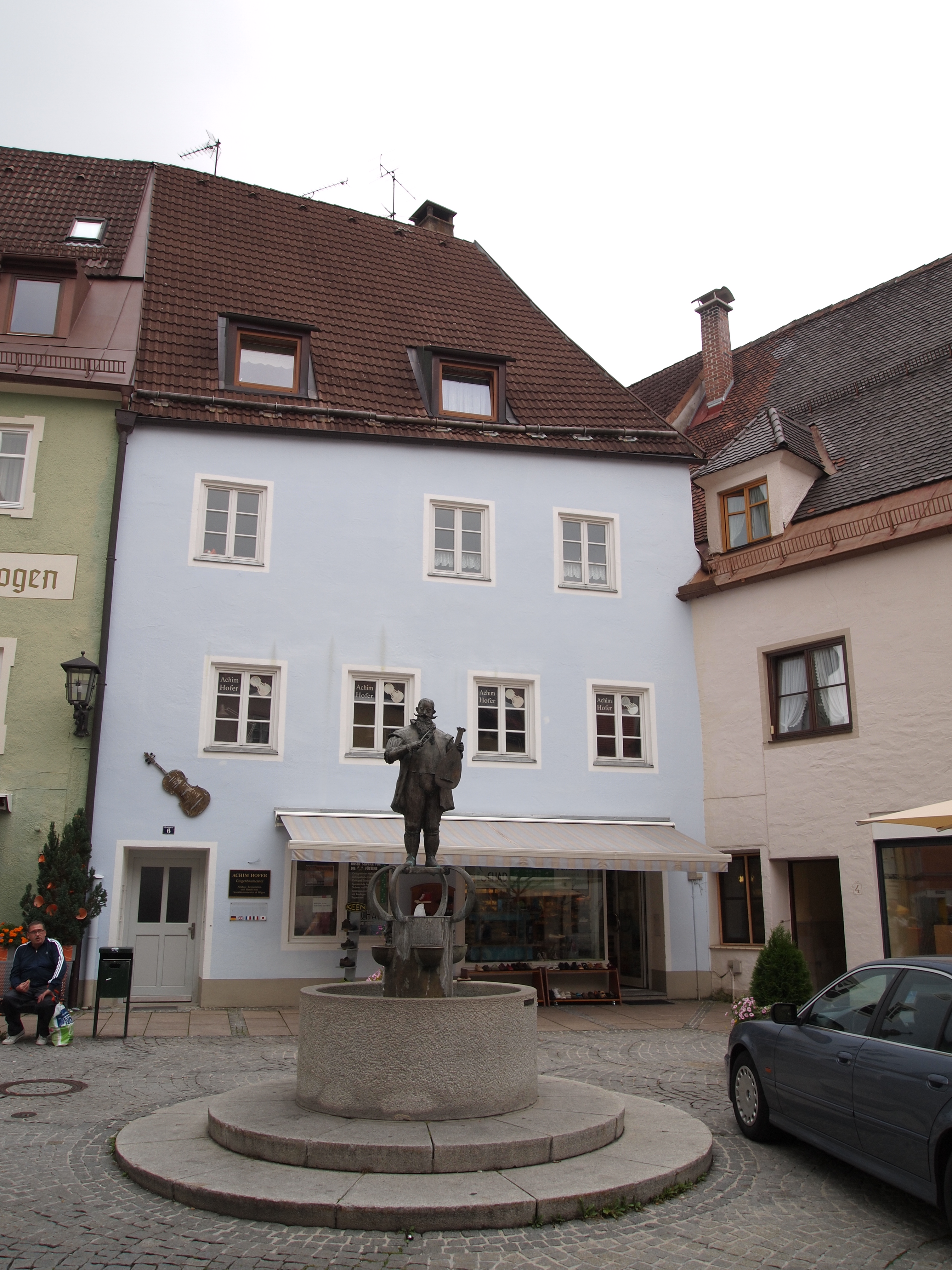 Füssen, Brotmarkt 6 mit Lautenmacherbrunnen von Joseph Michael Neustifter von 1990, Bronzefigur des Lautenmachers Caspar Tieffenbrucker